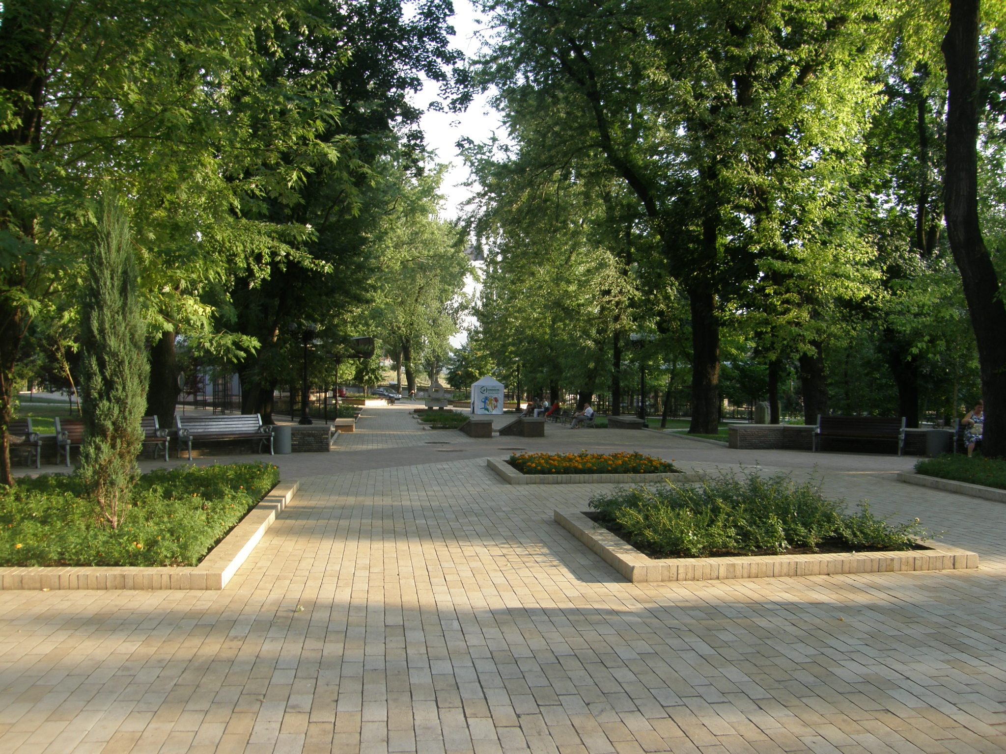 Донецк. Бульвар Пушкина.